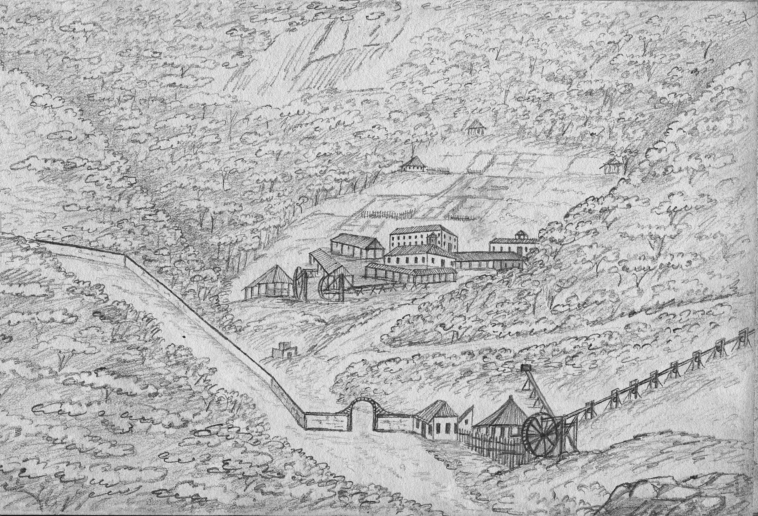 Mina de Gongo-Soco; desenho a lápis por Ernst Hasenclever durante sua visita à mina; caderno de desenho, 1839